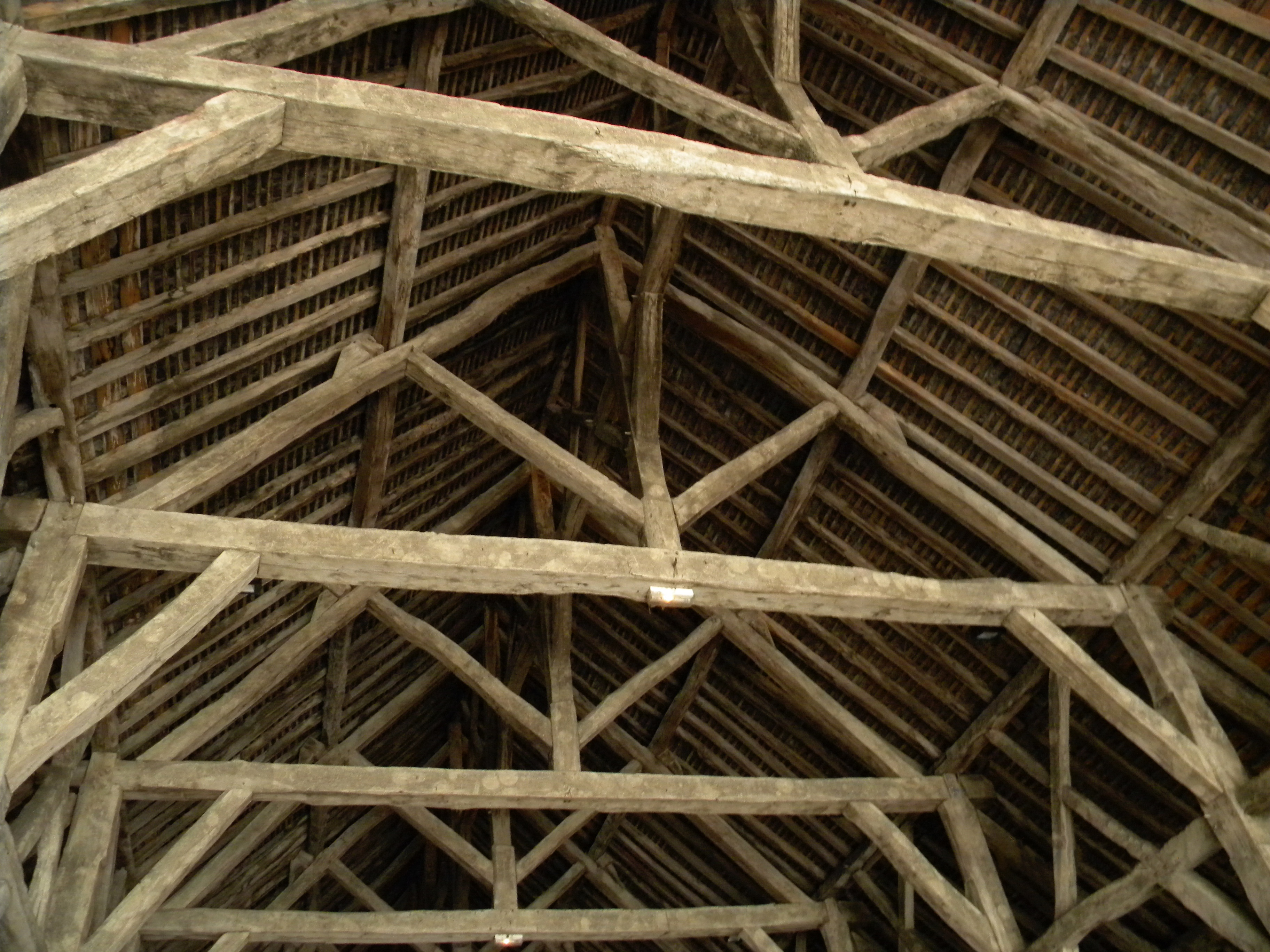 Détail de la toiture de la halle